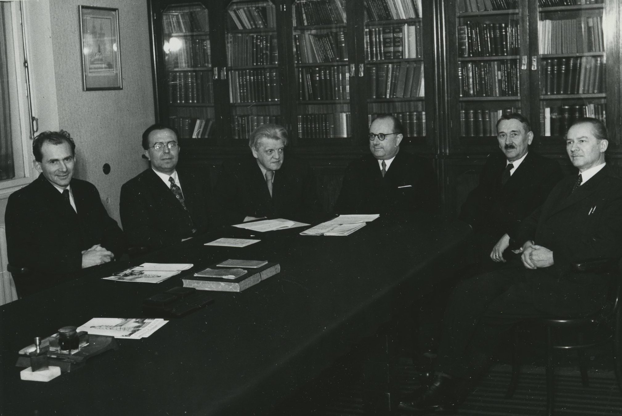 Synodní rada po 10. synodu, 1951. JUDr. Pavel Šimek, Jaromír Klimecký, synodní kurátor Gustav Hrejsa, synodní senior Viktor Hájek, náměstek syn. seniora Bohuslav Burian, náměstek syn. kurátora JUDr. Lubomír Jelen